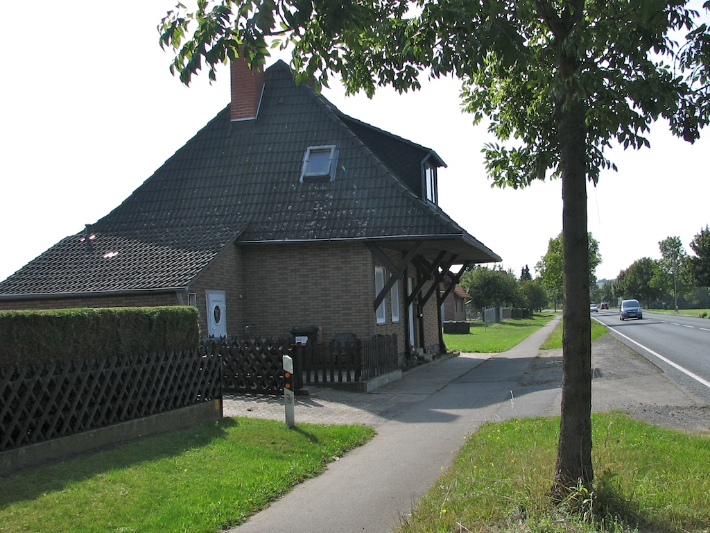 Weghaus in Salzgitter-Beinum